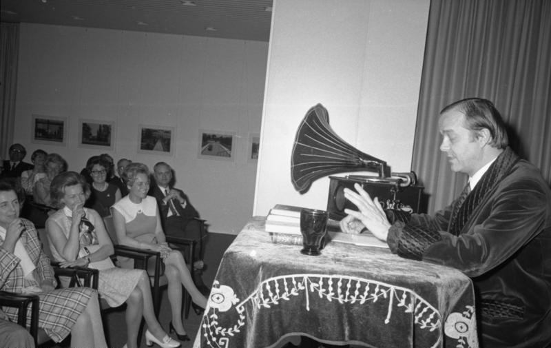 Dichterlesung in der Landesvertretung Berlin (Schauspieler Stefan Wigger)